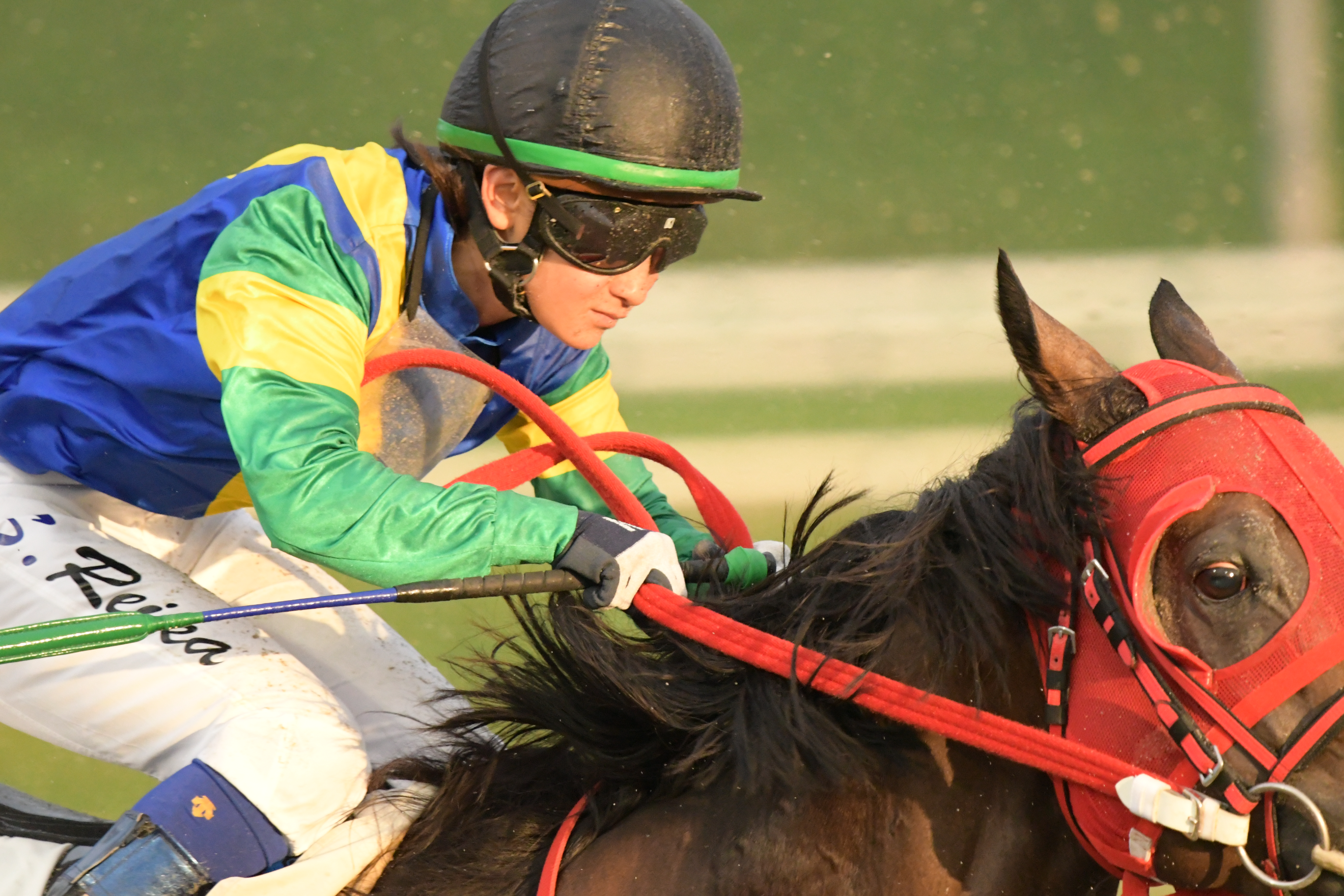 盛岡競馬場にて騎乗する関本玲花